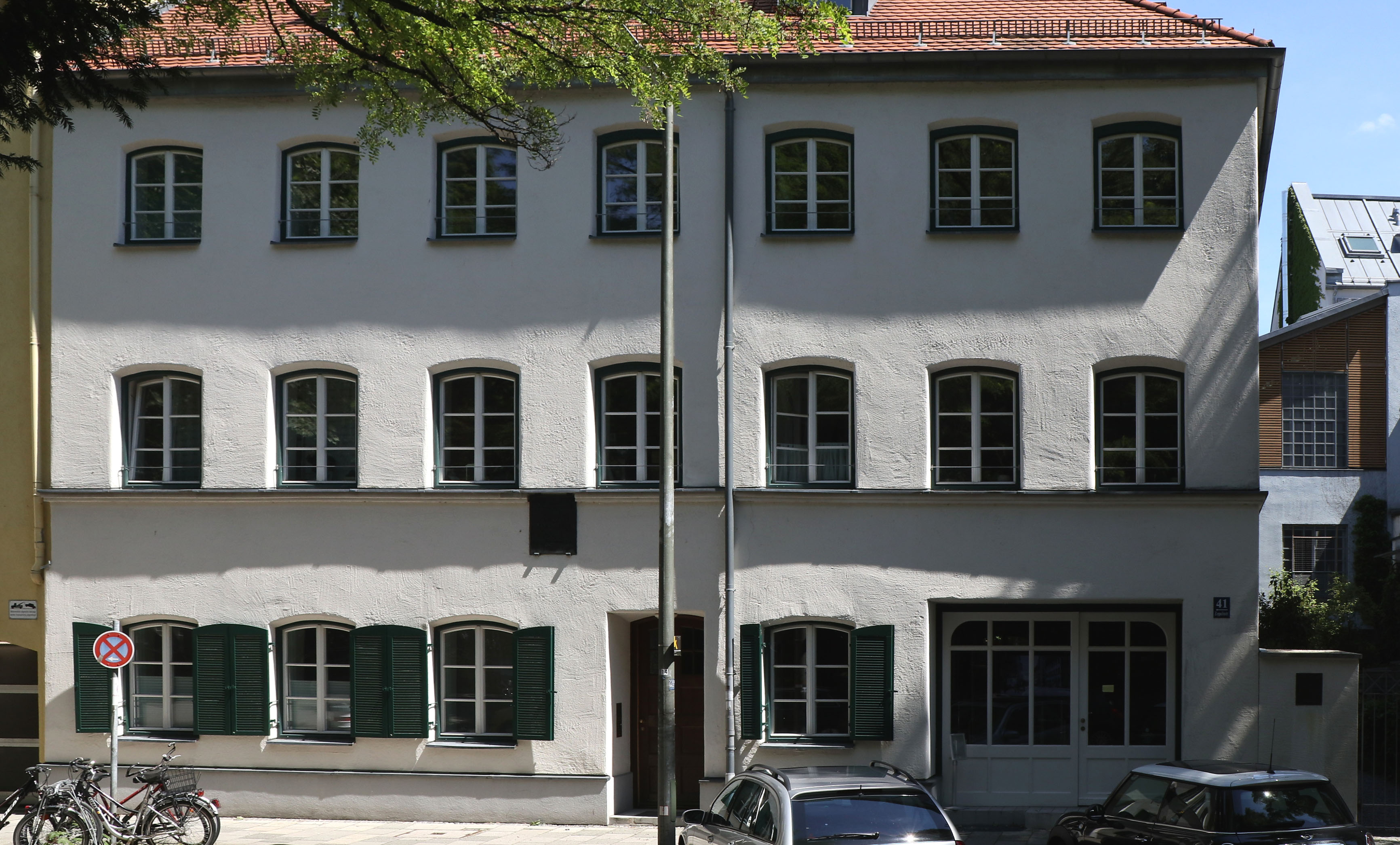 Geburtshaus von Karl Valentin in der Zeppelinstraße 41, Frontaufnahme, rechts mit Durchsicht zu den Hintergebäuden